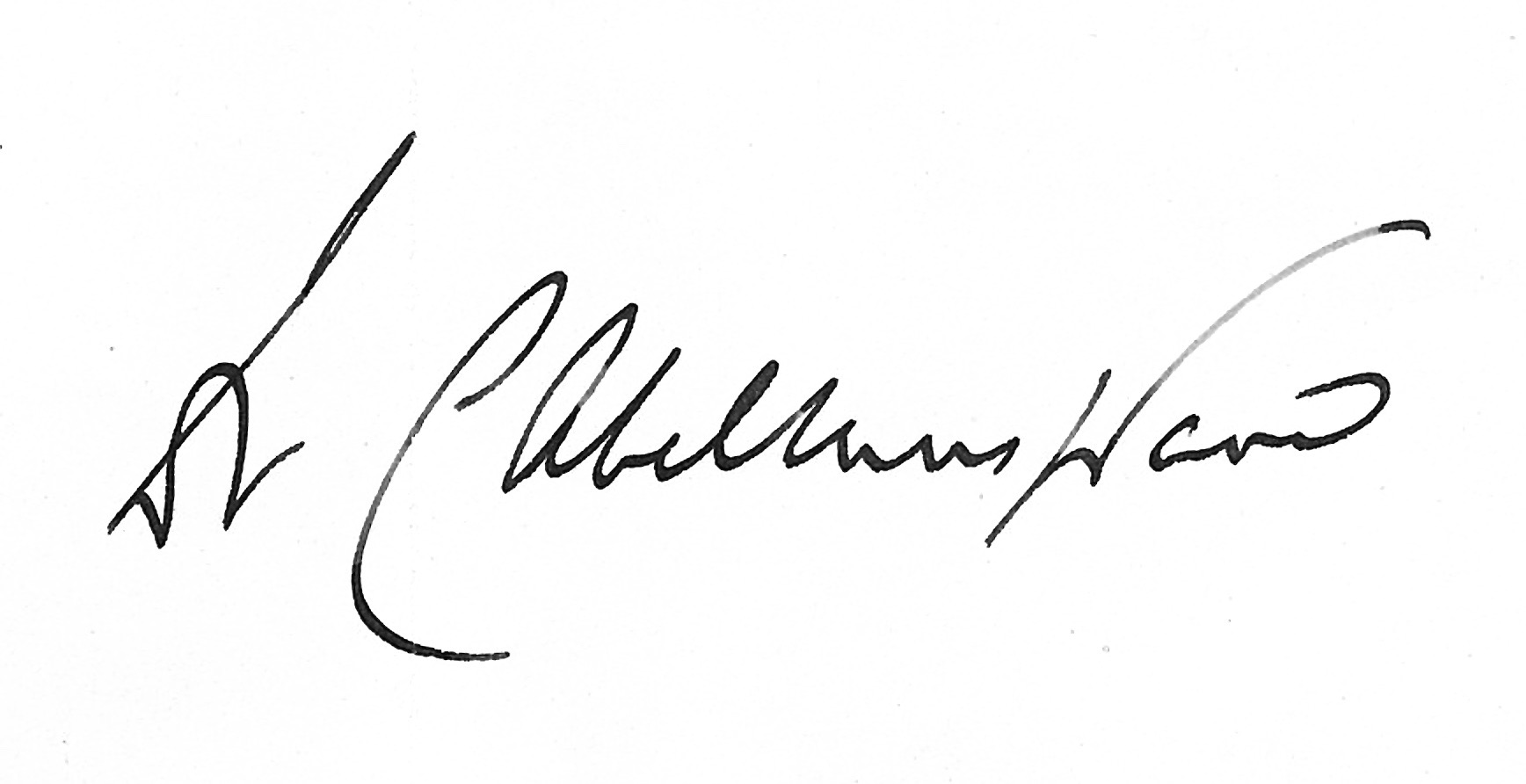 Handtekening van Dr. rer. nat. Curt Abel-Musgrave, 12 februari 1915